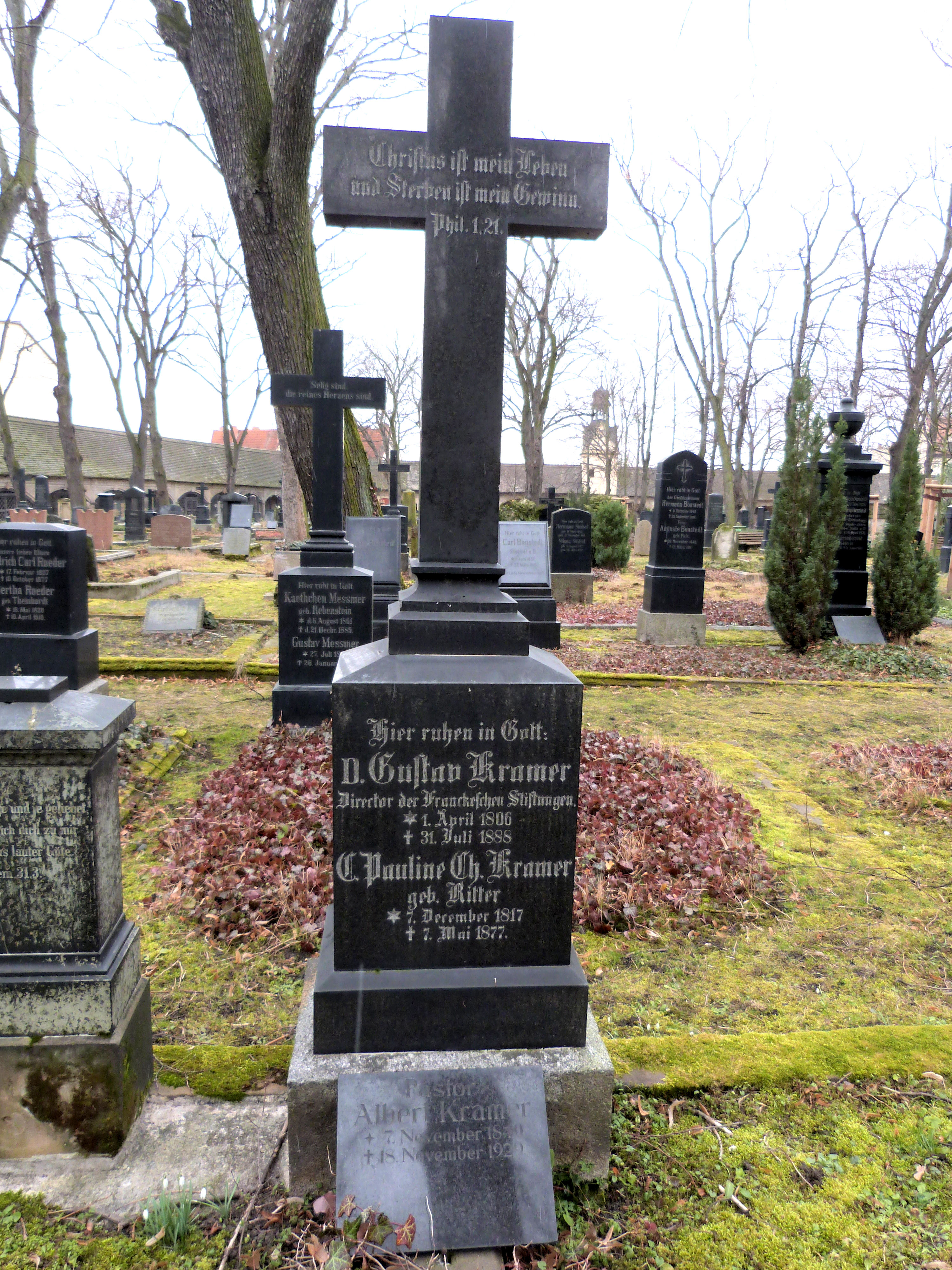 Grab von Gustav Kramer, Stadtgottesacker Halle, Innenfeld Abt. III